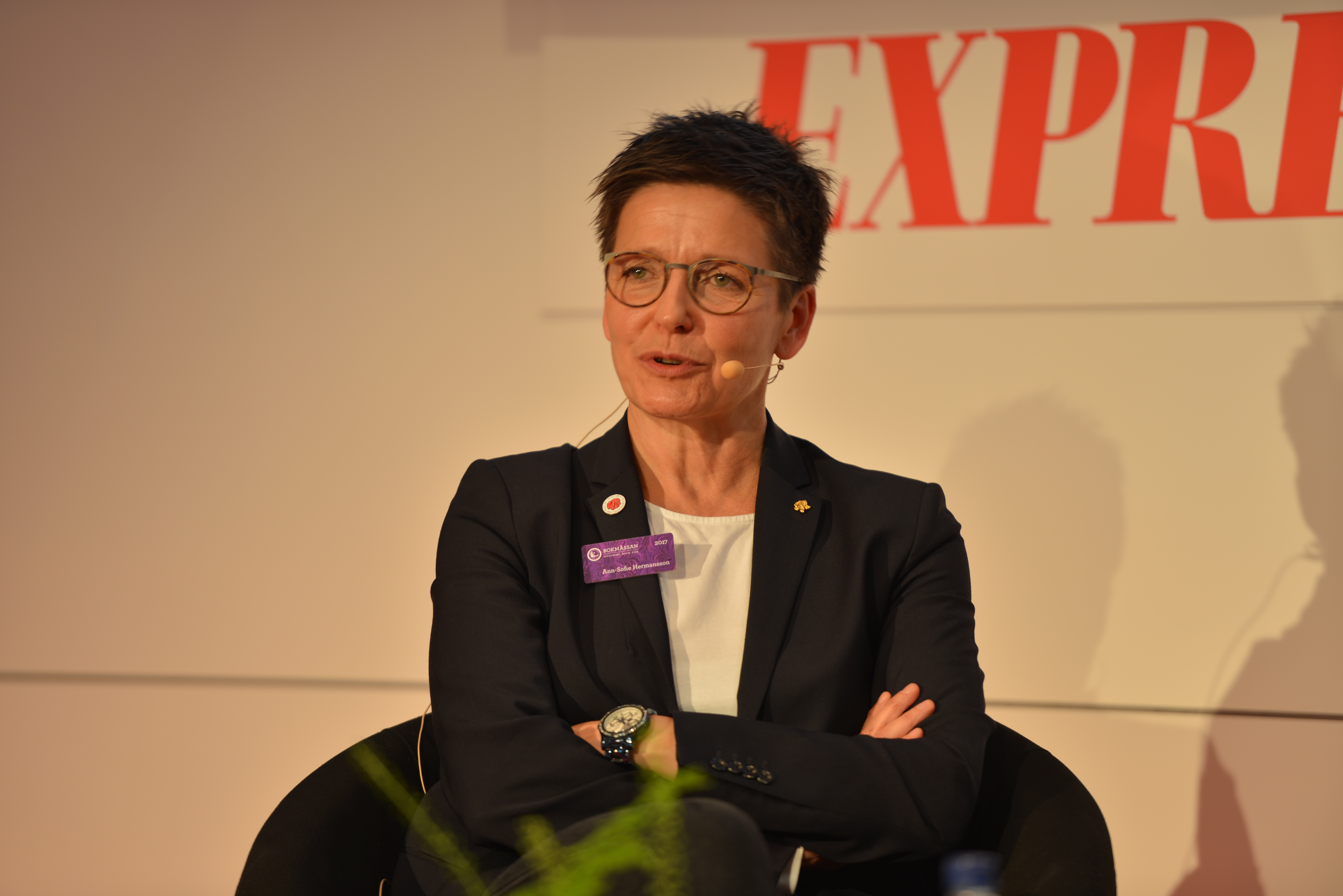 Göteborgs kommunstyrelses ordförande Ann-Sofie Hermansson på Expressens scen under Bokmässan i Göteborg september 2017.